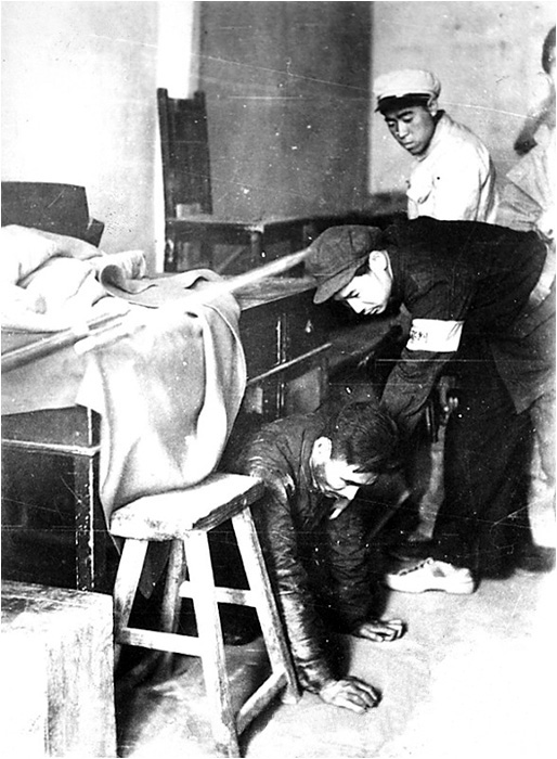 在开化寺阴阳巷2号院戴炳南的连襟家里活捉戴炳南